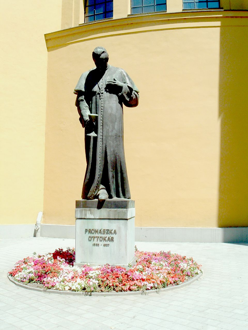 Prohászka Ottokár's statue in Székesfehérvár. Sculptor: Elemér Fülöp (1934)